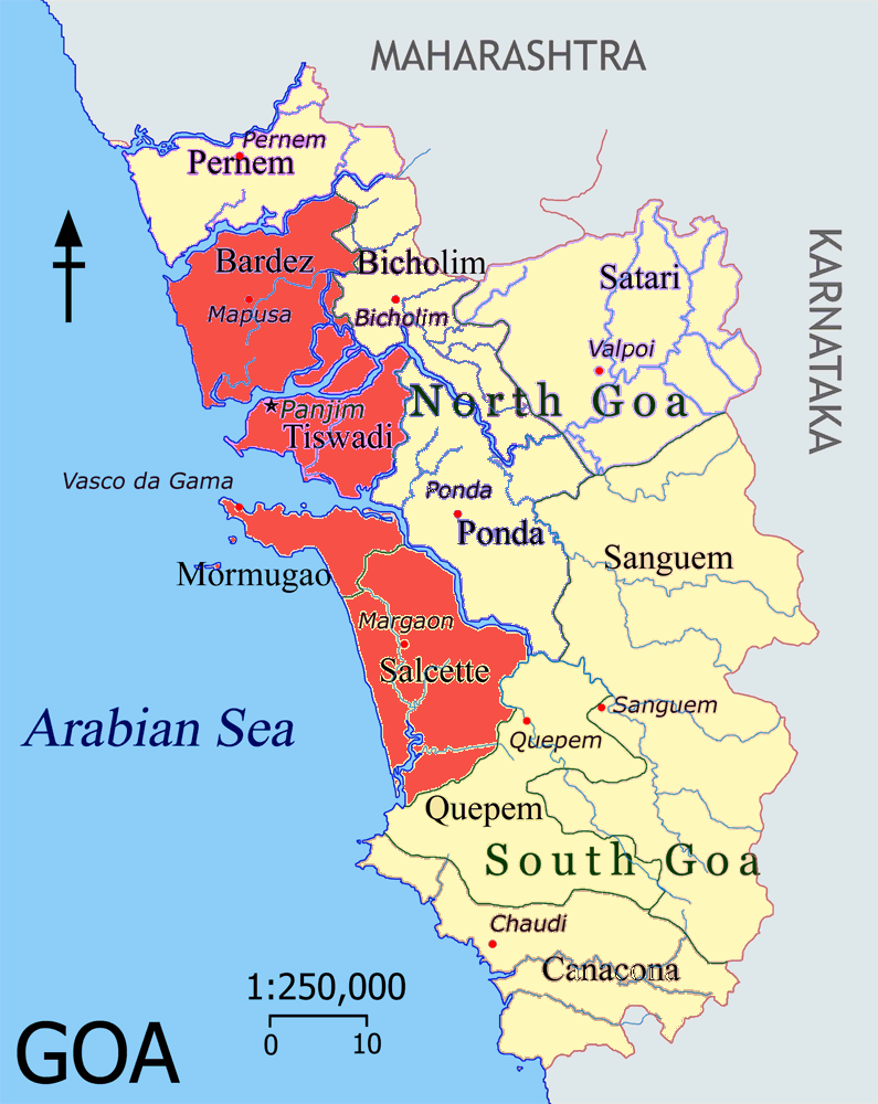 Novas e Velhas Conquistas (creme e rosa), Goa